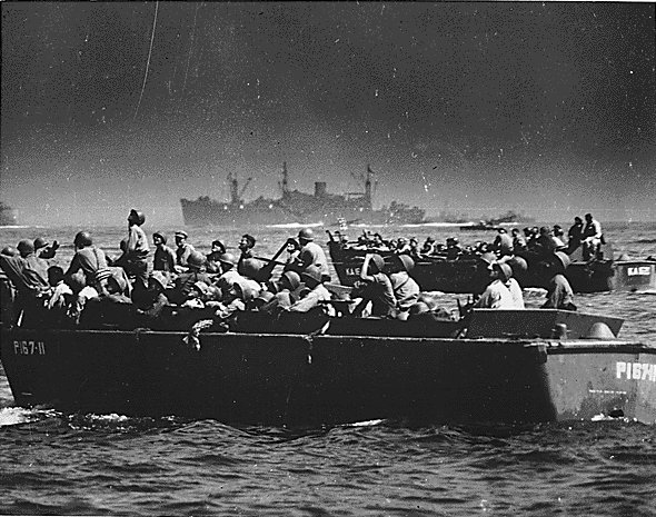 Über den Landungsbooten tobt eine japanische Luftangriffswelle. Landung auf Leyte.